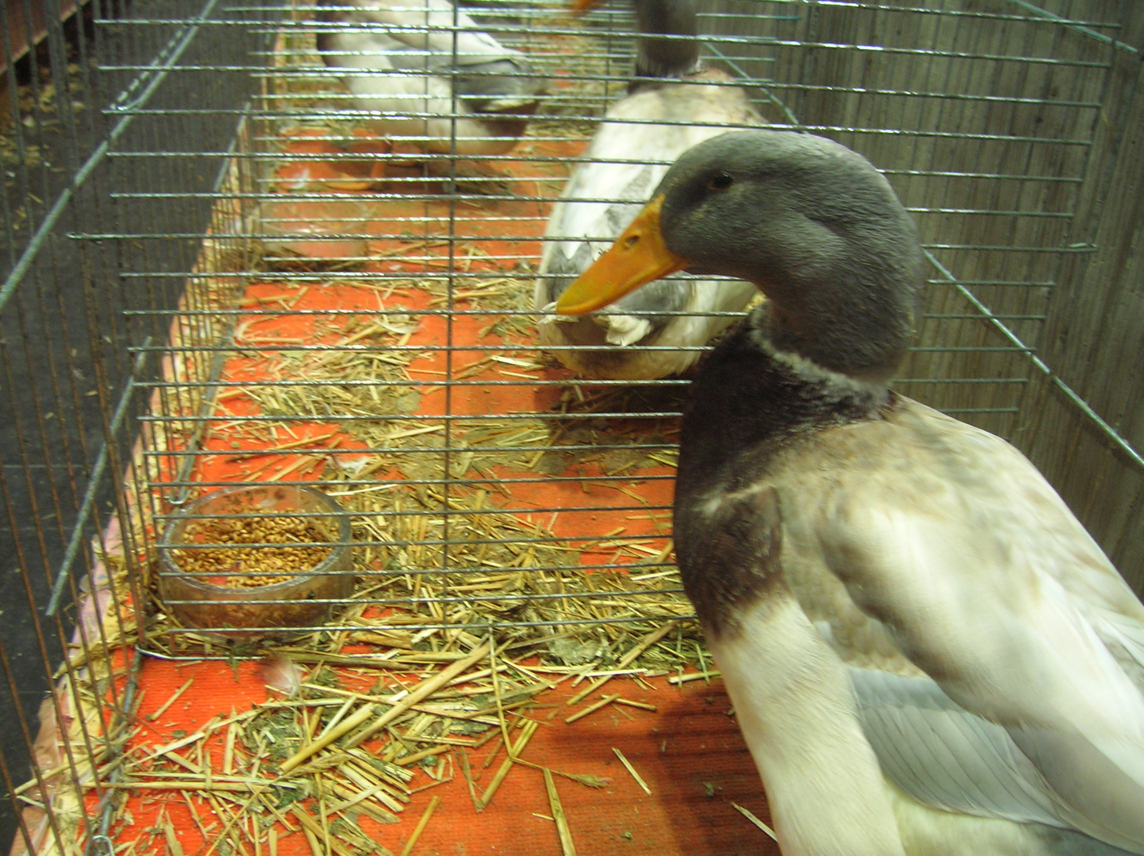 Sachsenerperl, Europaschau Leipzig 2012.